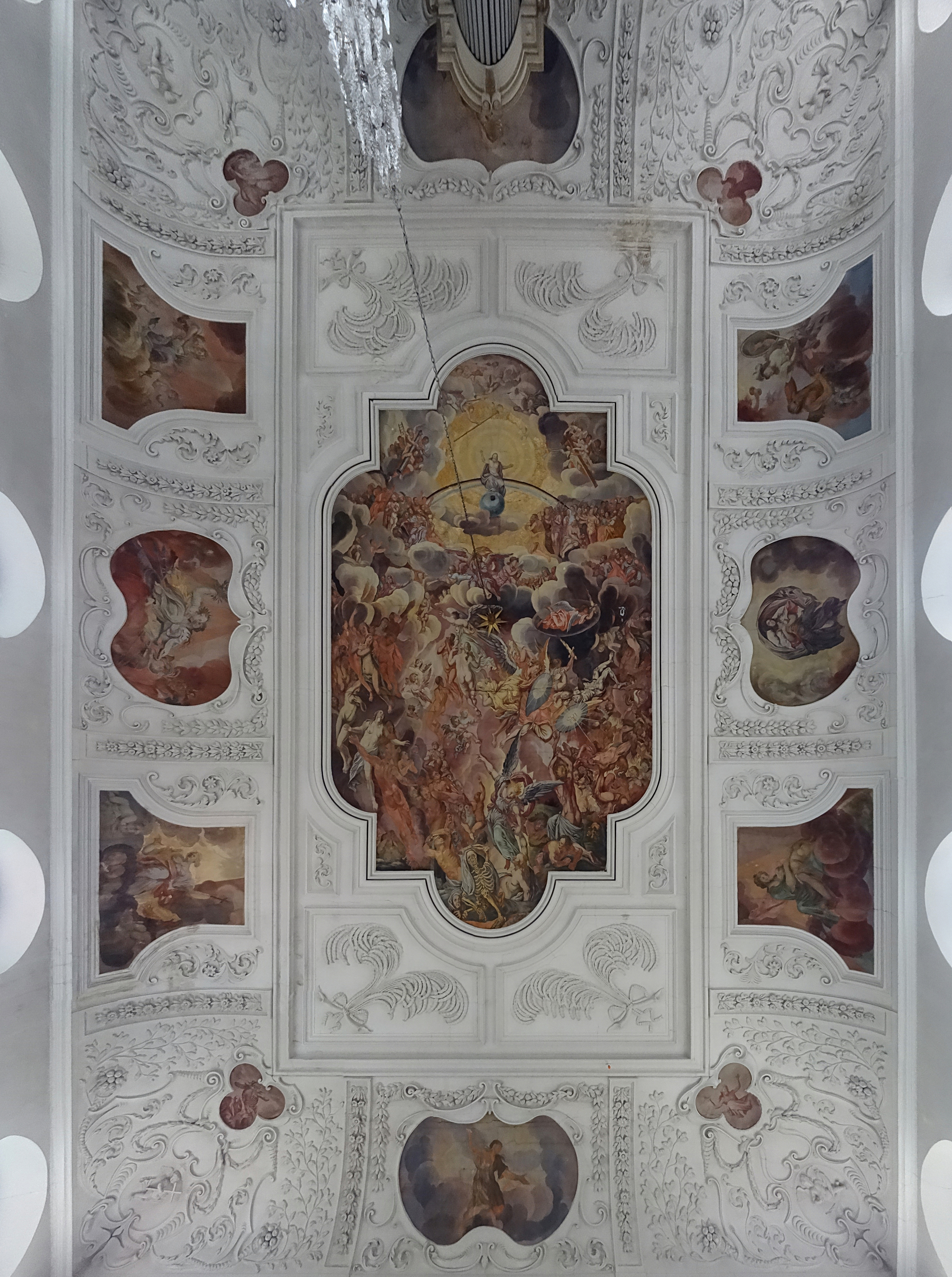 Deckenbilder in der Maria-Magdalenen-Kirche (Naumburg) von 1718